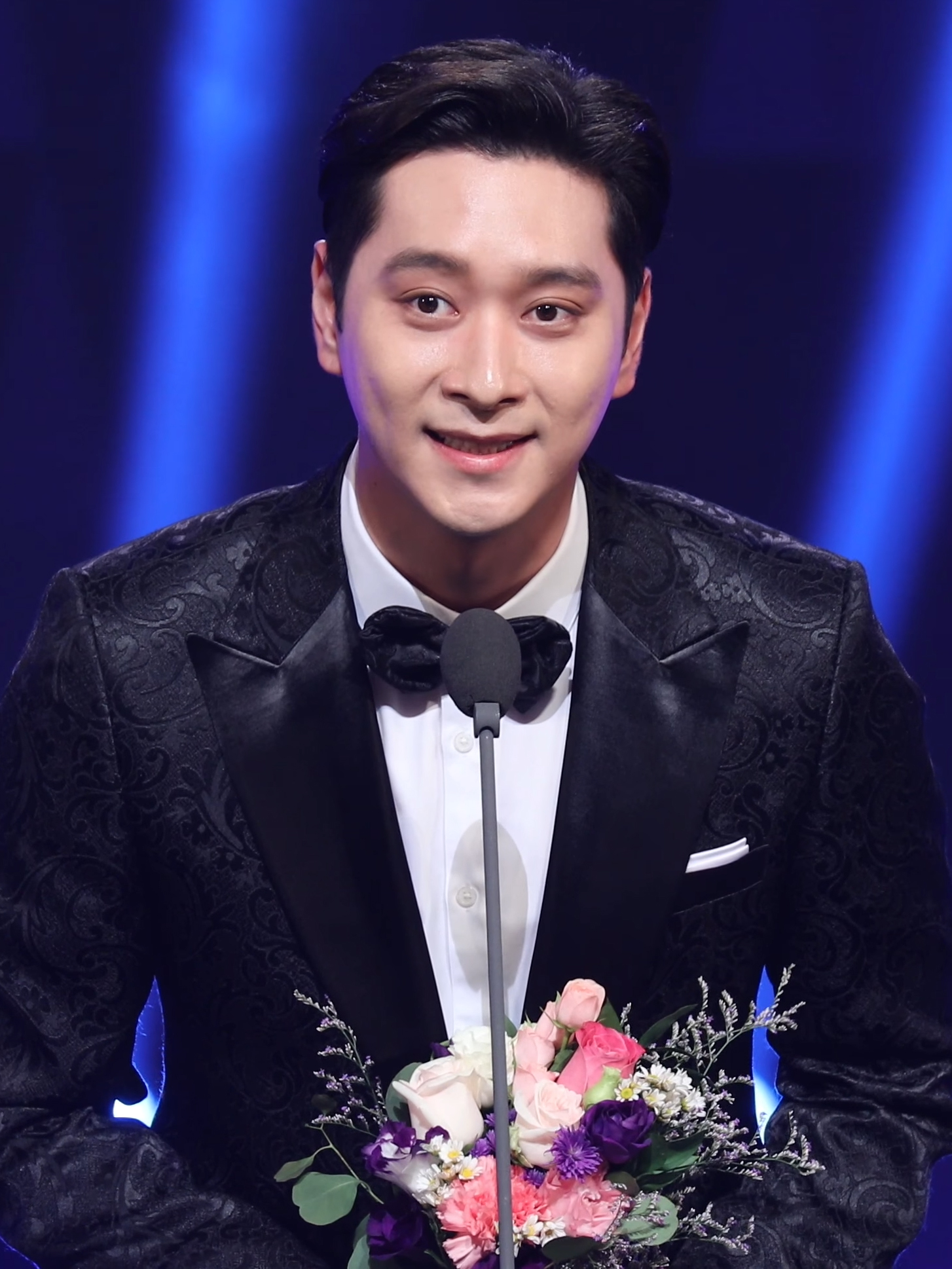 10월 2일 오후 경남 진주 경남문화예술회관에서 TV드라마를 대상으로 한 국내 단일부문 최대의 드라마 시상식인 제11회 코리아드라마페스티벌(2018) 시상식이 열렸다. 오후 5시 레드카펫을 시작으로 1,2부로 진행됐으며 네이버 V앱과 코리아드라마페스티벌 홈페이지를 통해 생중계됐다. 10월 1일부터 10월 14일까지 펼쳐지는 코리아드라마페스티벌은 (사)코리아 드라마 페스티벌 조직위원회 가 주최/주관하며 문화체육관광부, 경상남도, 진주시, (사)한국방송인회가 후원한다. #황찬성 #차은우 #Chansung #CHAEUNWOO #한류스타상황찬성 #한류스타상차은우 #코리아드라마어워즈 ©The JH Media